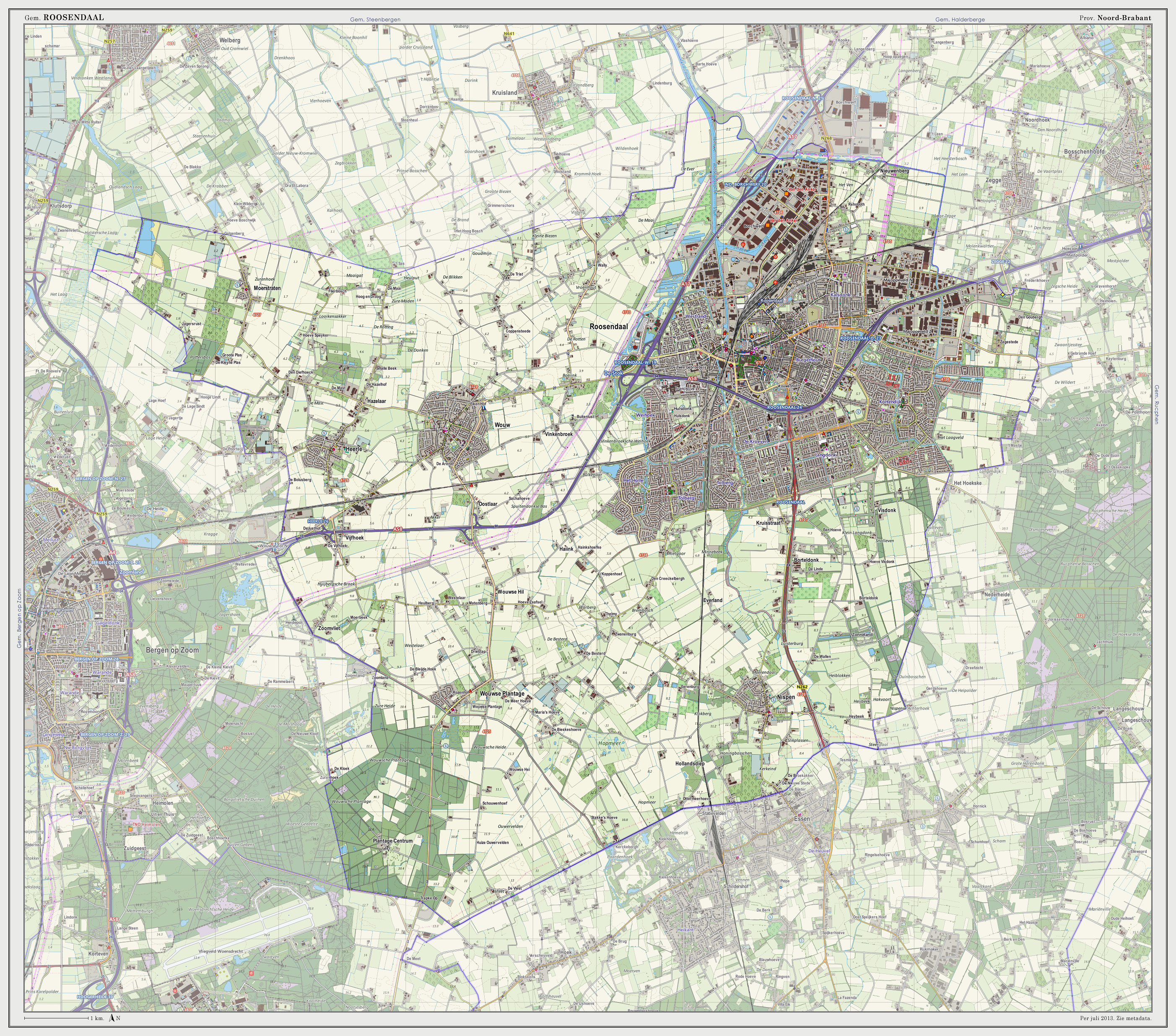 Topografische kaart van gemeente Roosendaal (2013). Samengesteld door Jan-Willem van Aalst op basis van de GML open geodata van de BRT/Top10NL (basisregistratie Topografie, Kadaster 2011), vrijgegeven door Kadaster onder de Creative Commons BY licentie. Additionele gegevens uit BAG (8 juli 2013), uit de Open Street Map (9 juli 2013) en uit de Risicokaart. Peildatum kaartbeeld: 9 juli 2013. Zie ook Gemeentenatlas.nl Samenstelling en kleurenschema: Jan-Willem van Aalst, met QuantumGIS en Photoshop. Zie ook de Legenda.